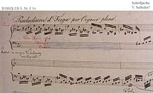 1epage du prélude